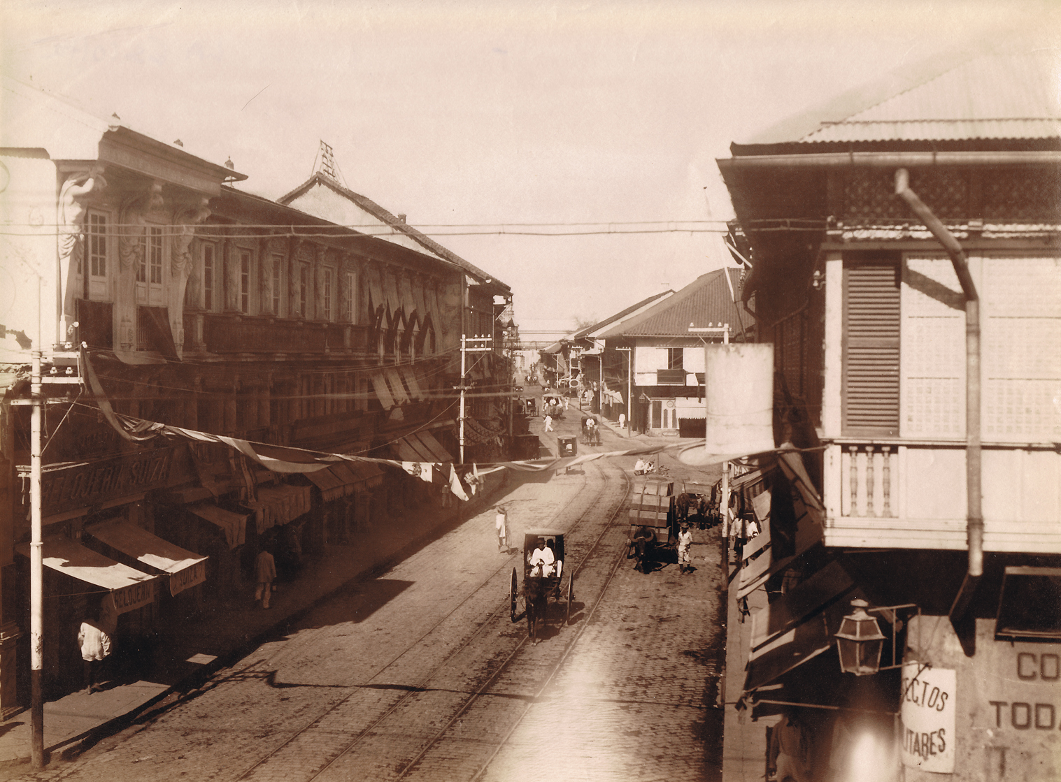 Escolta Manila 1878.